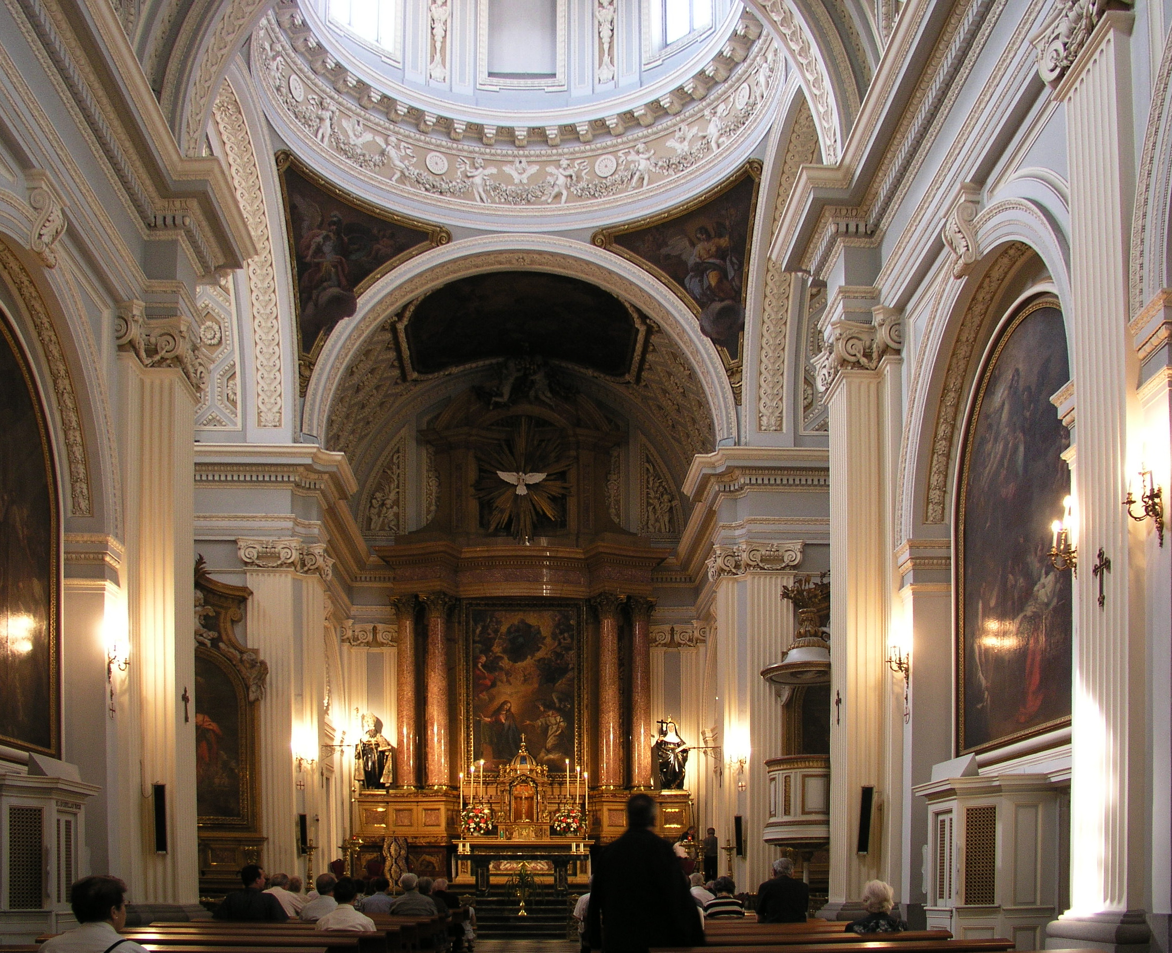 Real Monasterio de la Encarnación, Madrid, Spain